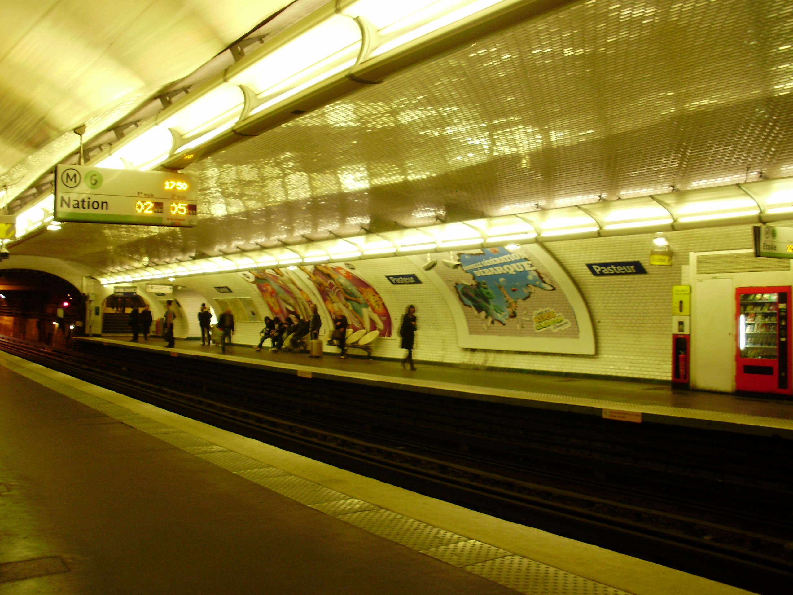 Quais de la station Pasteur (ligne 6) du métro de Paris